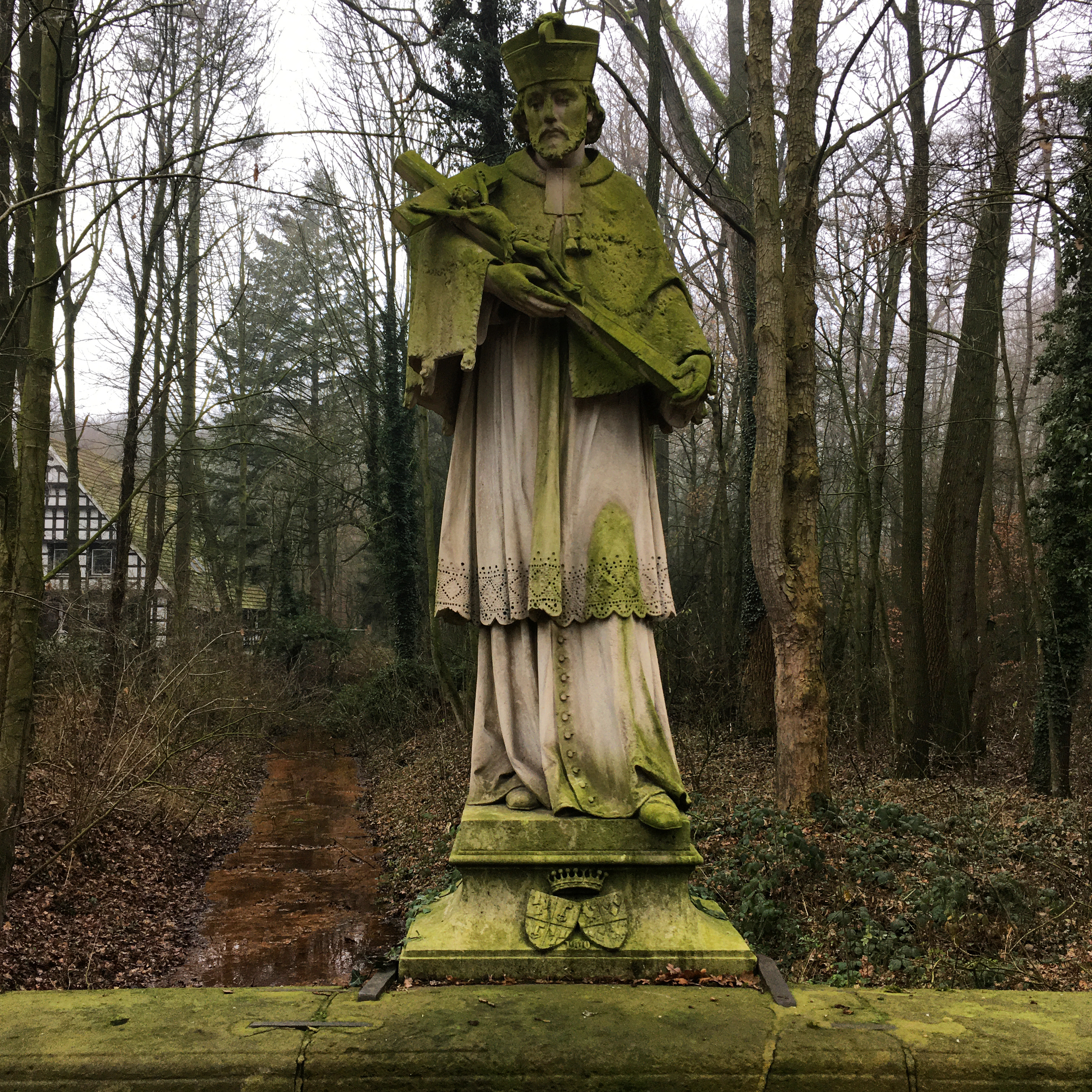 Statue des Johannes Nepomuk auf der Nepomuk-Brücke in Dinklage